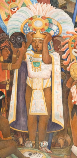 Detalle de coquitao o rey zapoteca del mural "Epopeya del pueblo mexicano" de Diego Rivera, posible apariencia del rey Cosiioeza